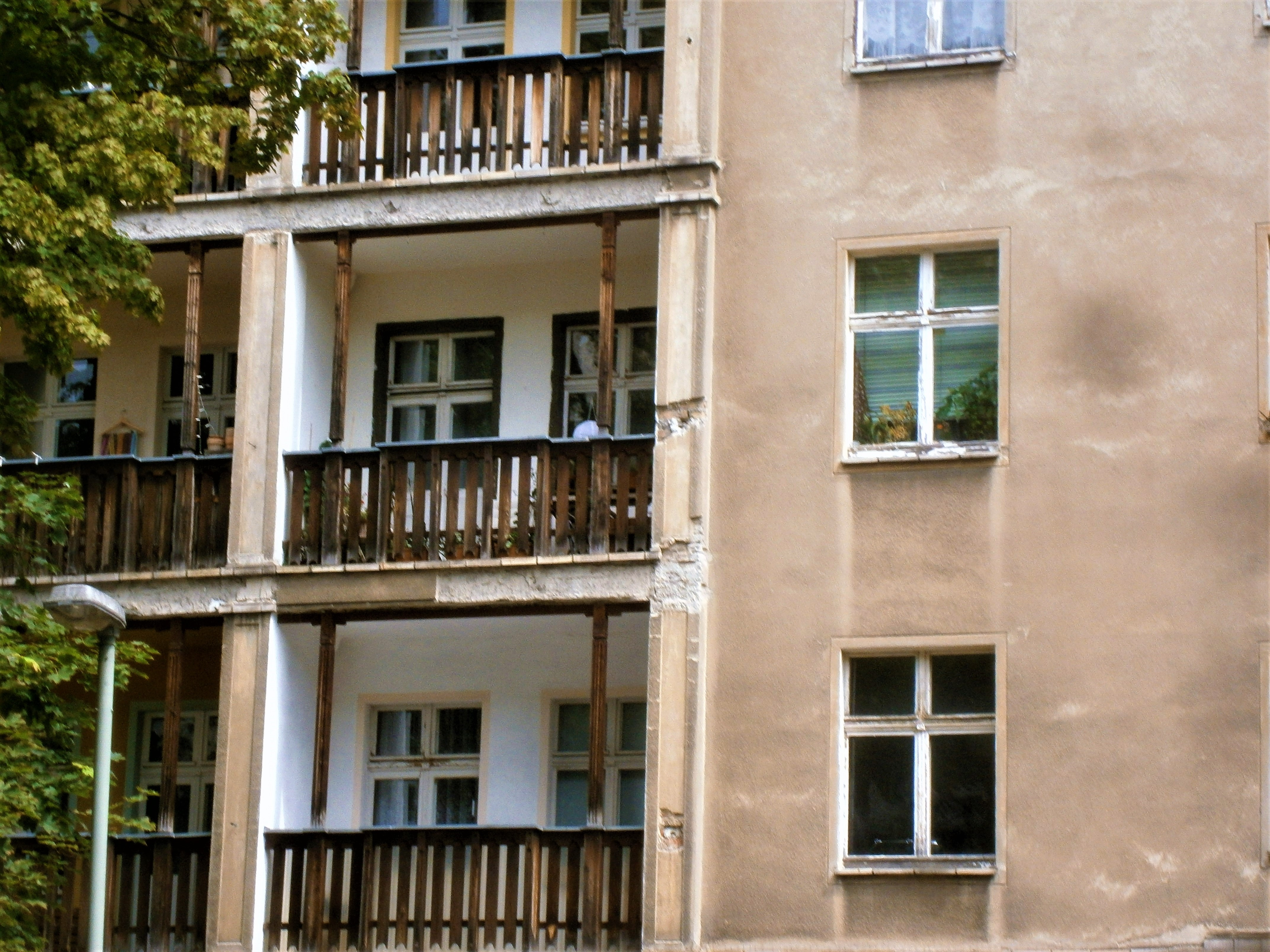 Die Marchlewskistraße ist eine Straße im Berliner Bezirk Friedrichshain-Kreuzberg, Ortsteil Friedrichshain. Angelegt und benannt wurde sie um 1870 auf dem Communicationsweg außerhalb der abgerissenen Berliner Zollmauer unter dem Namen Memeler Straße. Im Jahre 1950 erfolgte die Umbenennung in Marchlewskistraße. Schwere Schäden an der Bebauung bei Luftangriffen im Zweiten Weltkrieg brachten beim Neuaufbau Änderungen, jedoch der Straßenlauf blieb erhalten. Das Bild zeigt im Einzelnen: Das Haus Marchlewskistraße 49 wurde 1952 erbaut, das unsanierte Gebäude zeigt und zeigt 2017 nach 65 Jahren Fassadenschäden